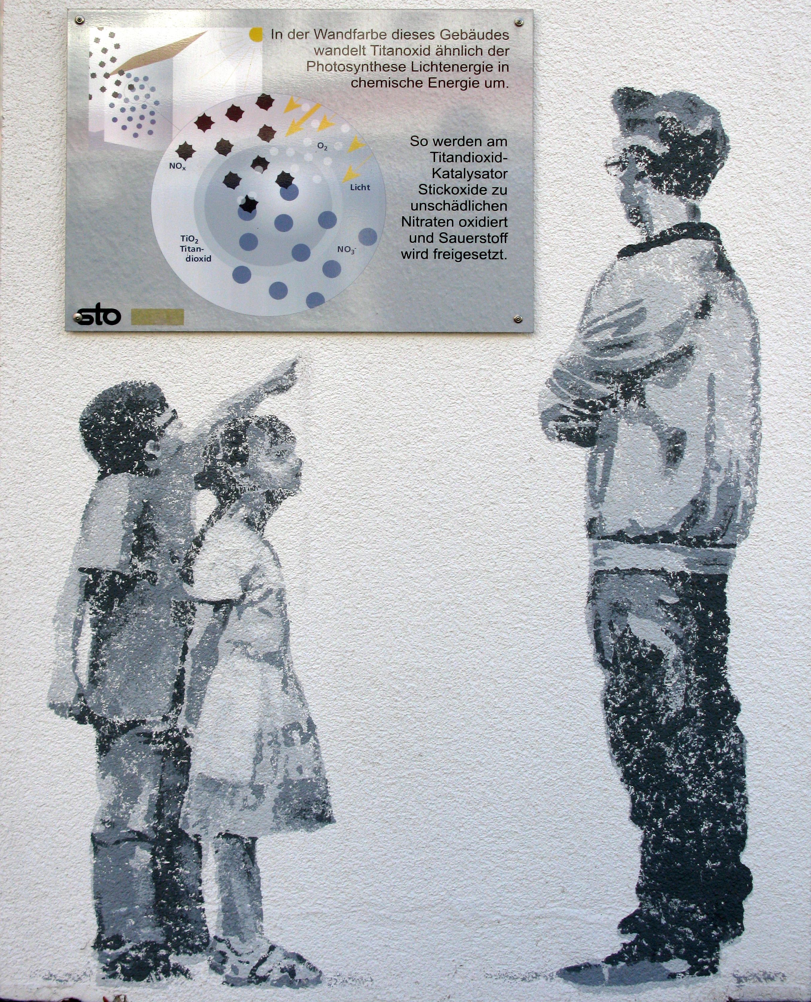 Wandfarbe mit Titandioxid-Katalysator in Freiburg-Rieselfeld